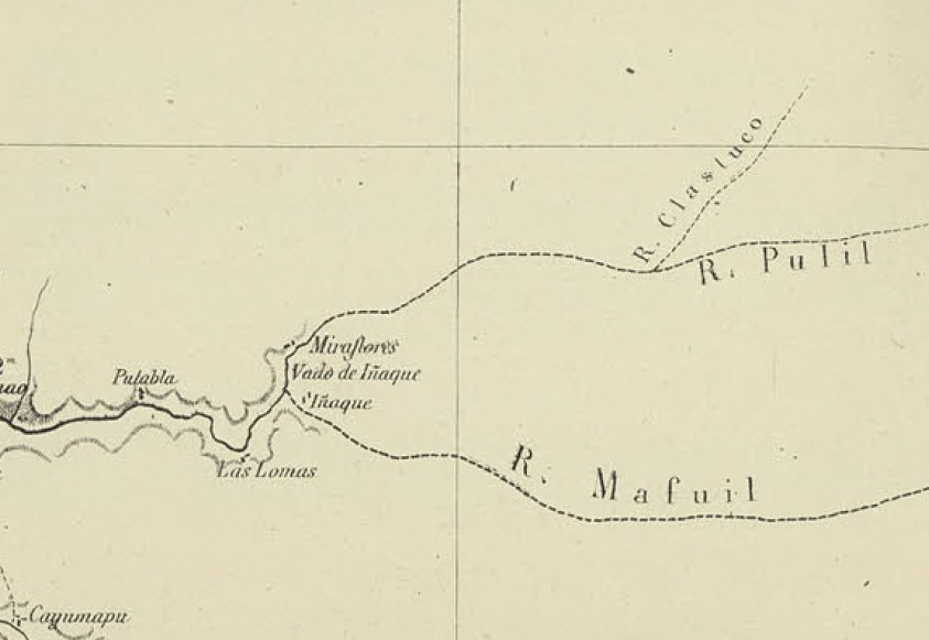 Putabla e Iñaque en el Mapa de Expedicion de la Francisco Vidal Gormaz